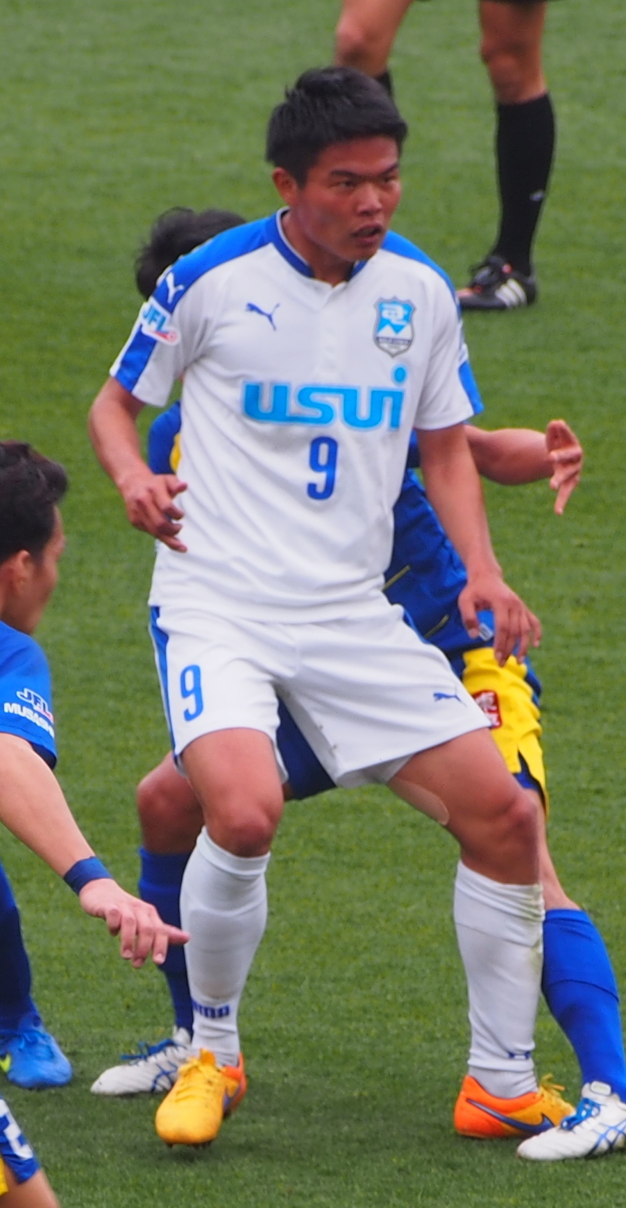 JFL 2016/4/10 東京武蔵野シティFC 対 アスルクラロ沼津 武蔵野市立武蔵野陸上競技場